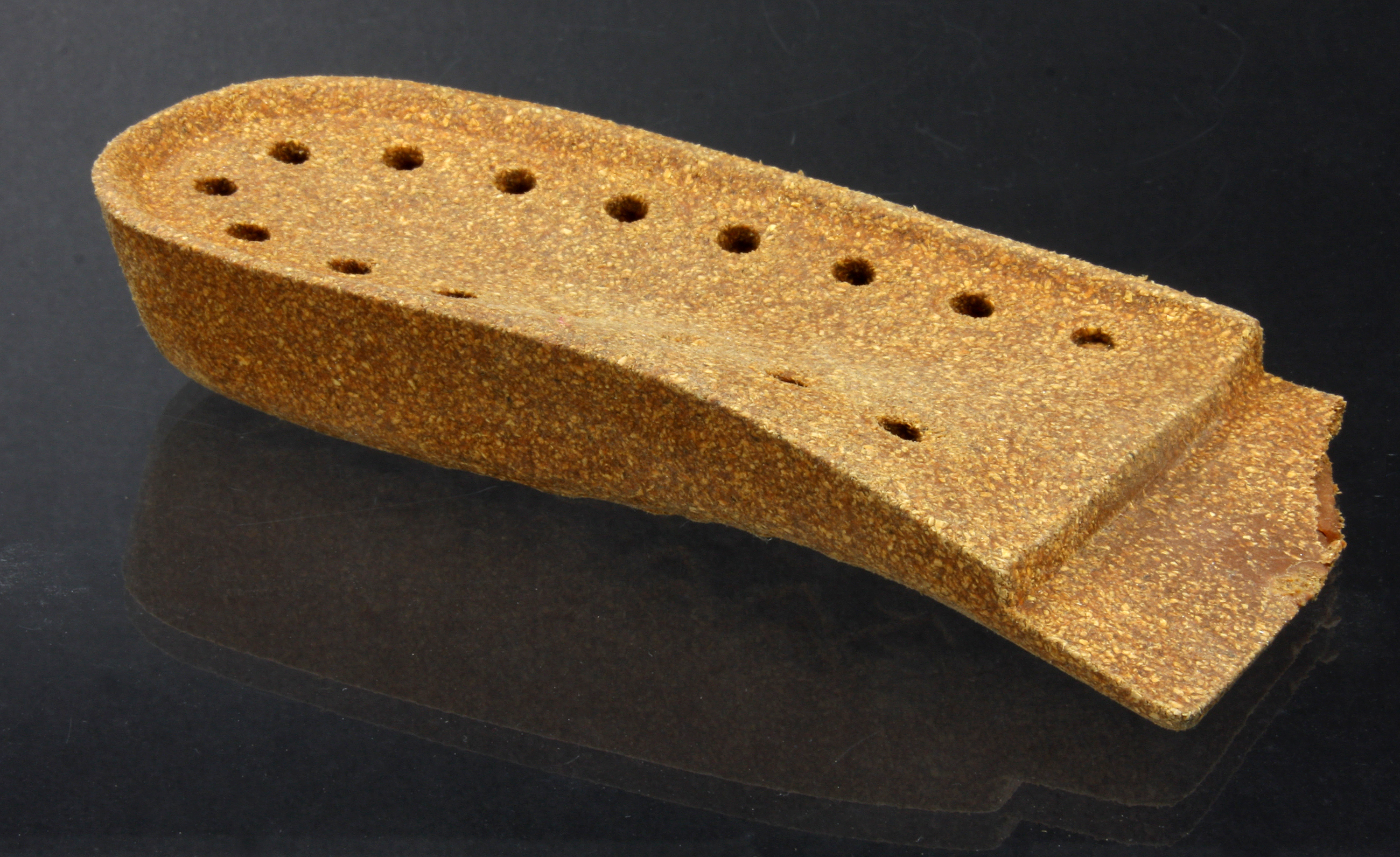 Fußbett aus Kork-Elastomer-Verbund